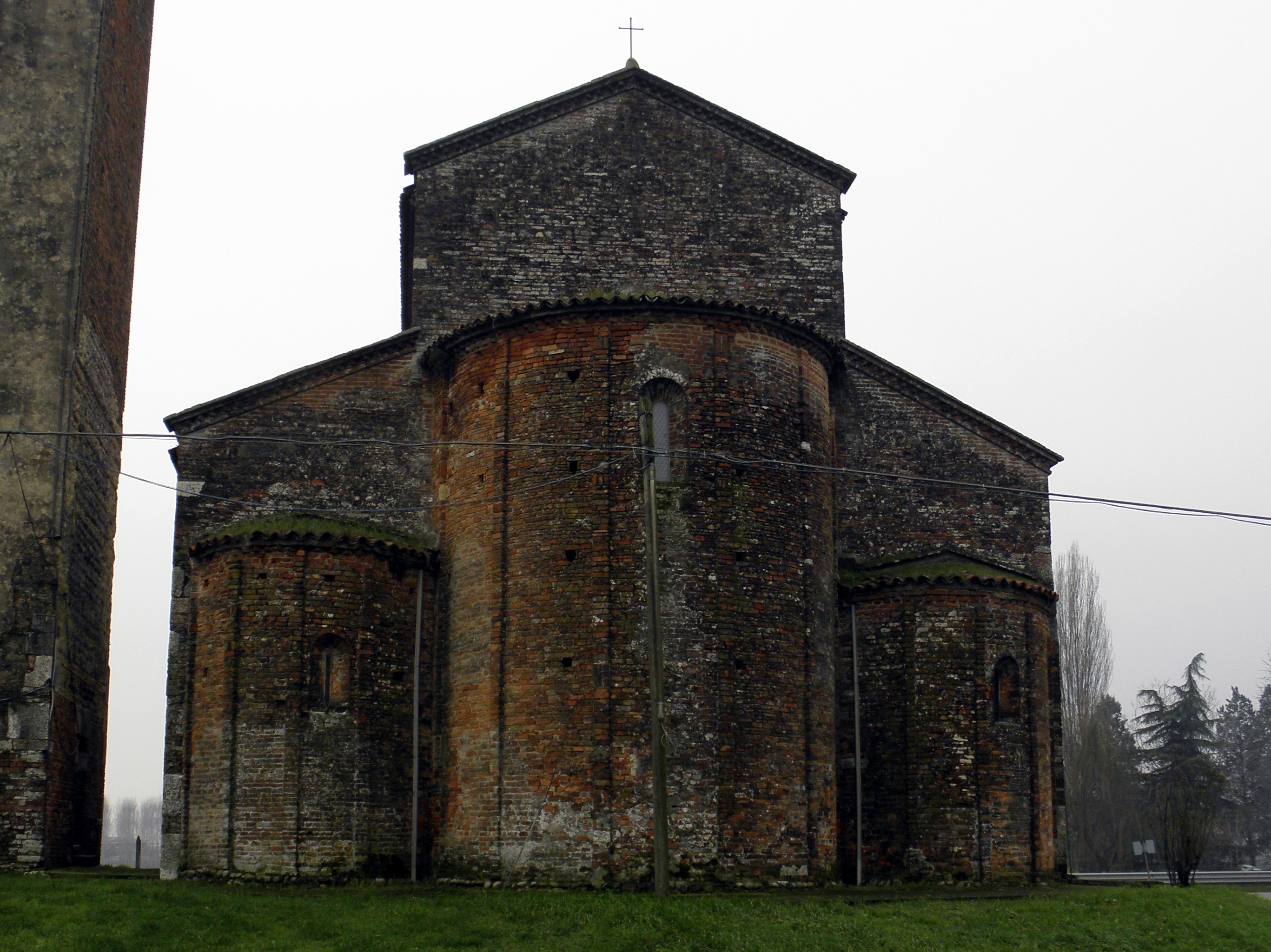 Cerea, la romanica chiesa di San Zeno (XII secolo).